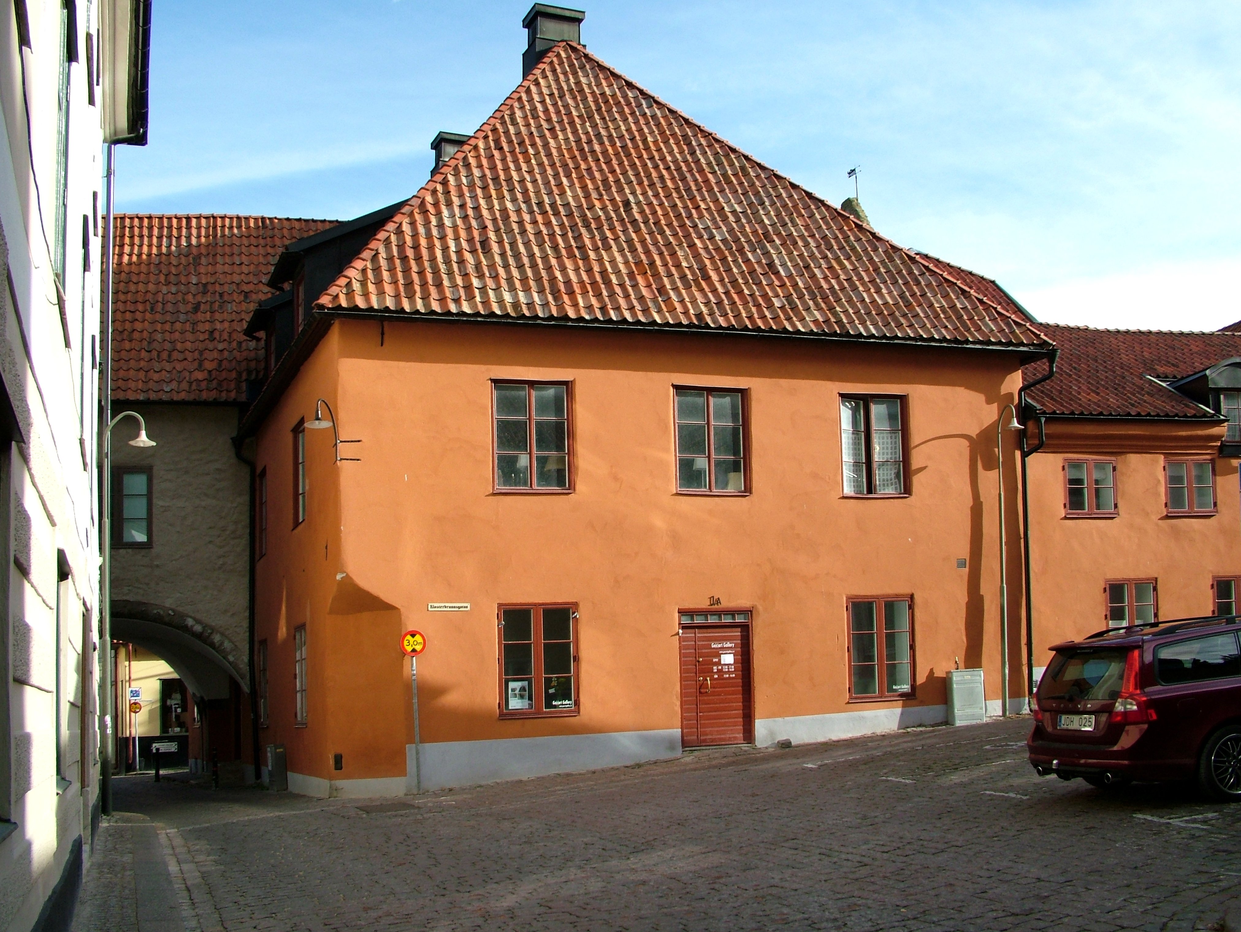 Rethwischs hus, södra fasaden mot Klosterplan. Till vänster f d Rådhuset och Sankt Hansgatan norrut genom valvet.